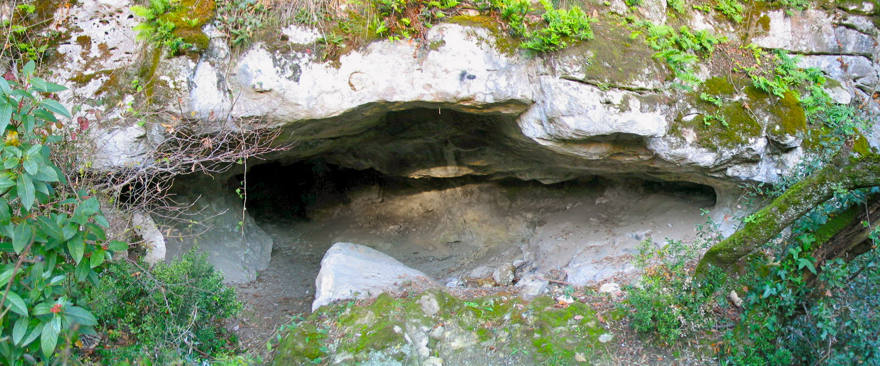 La Grotte de la Trache est une grotte préhistorique située près du hameau de la Trache, sur la commune de Châteaubernard, dans le département de la Charente.